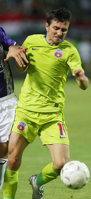 Újpest FC - FC Steaua Bukarest Euro Liga 2009